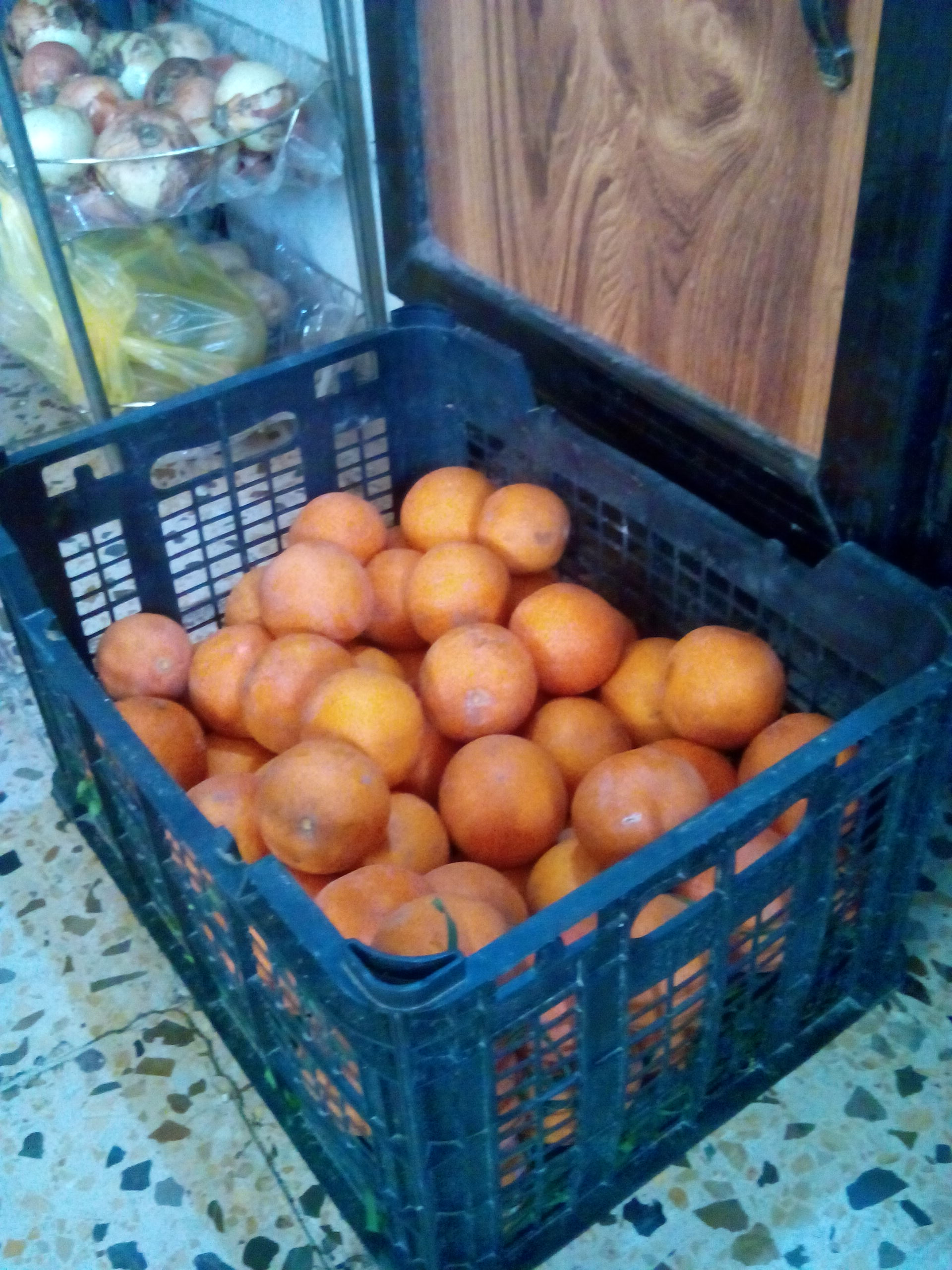 صندوق برتقال